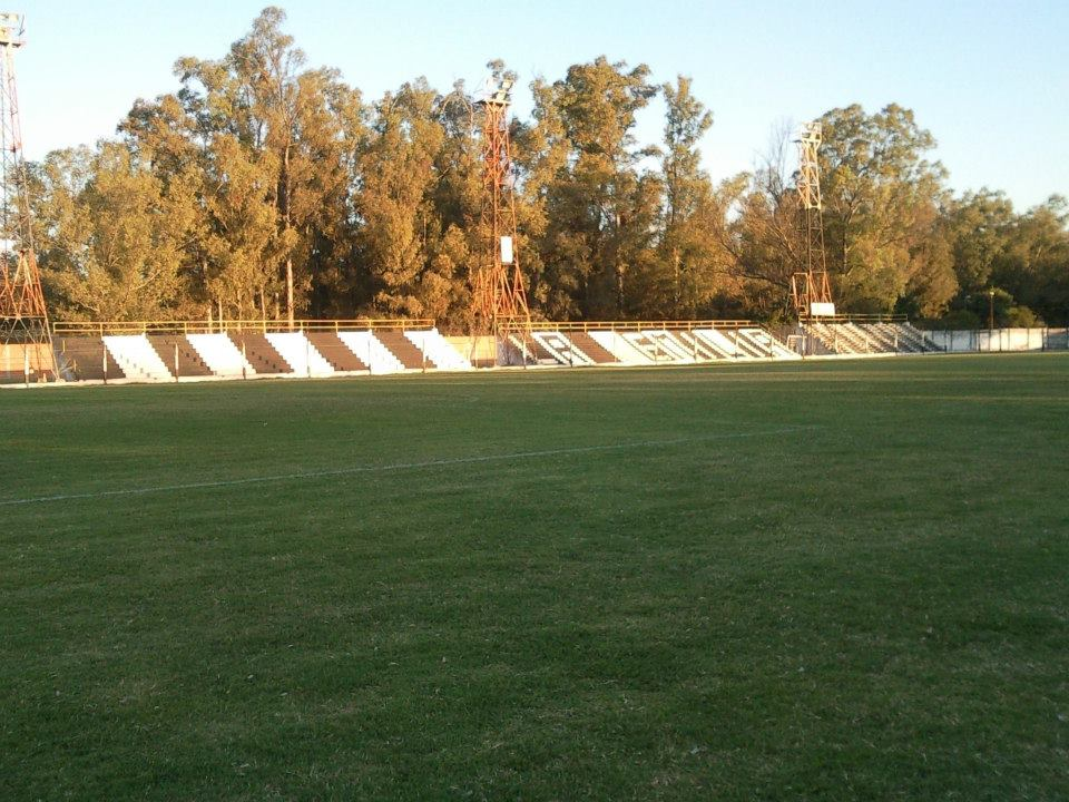 afdassf